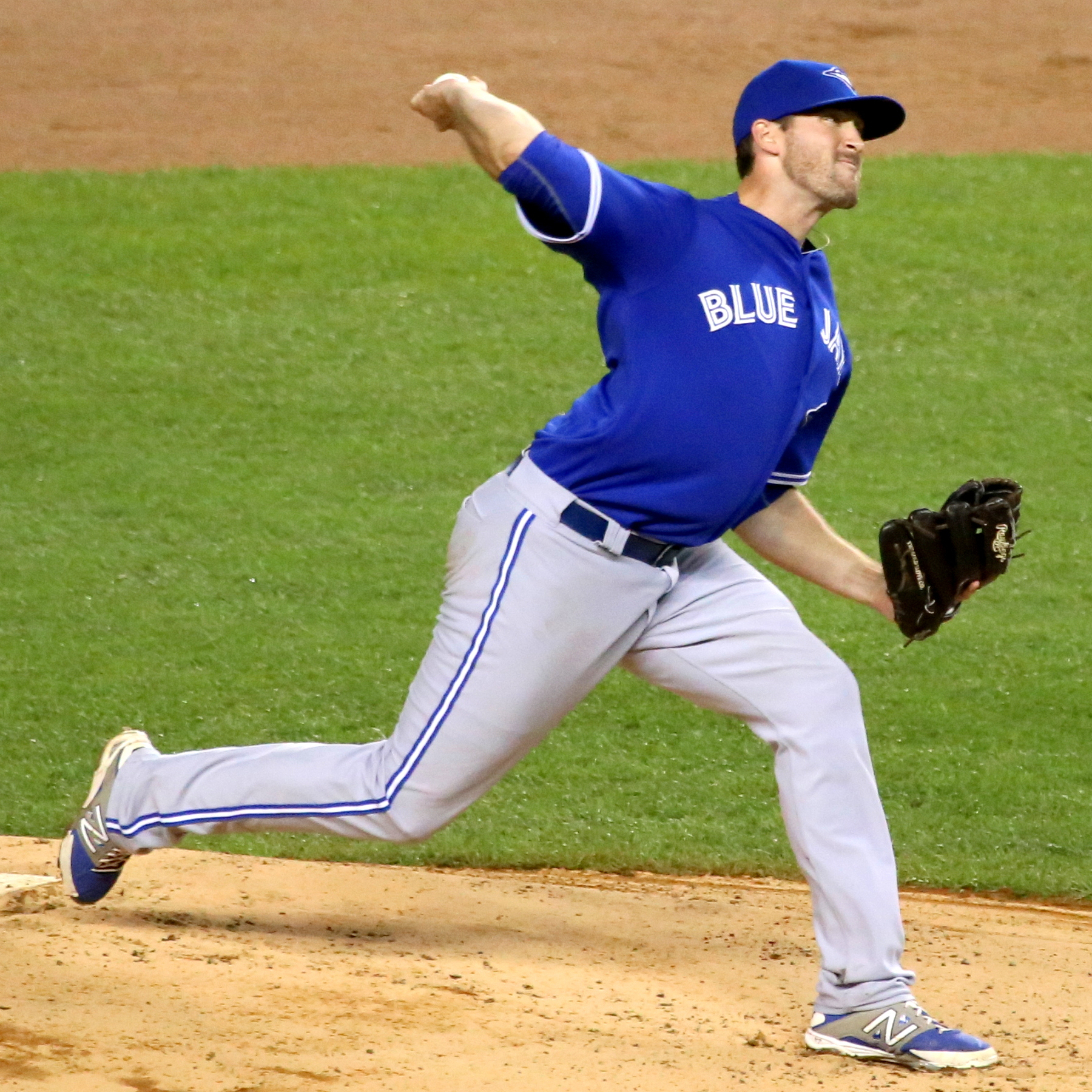 Bo Schultz